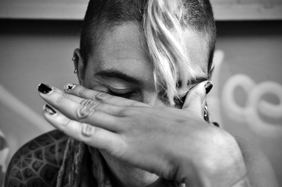 Shame